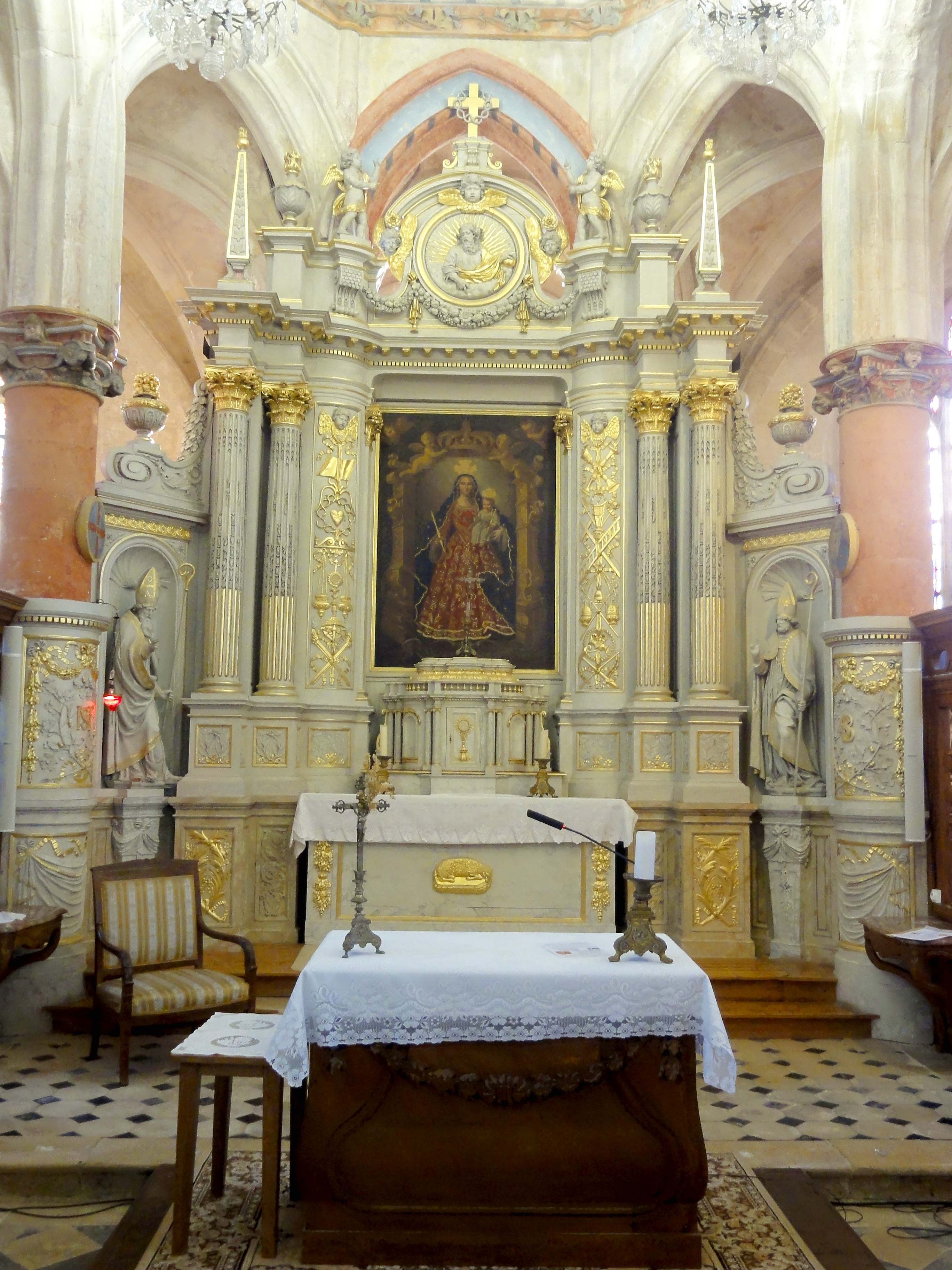 Mobilier de l'église - voir titre.